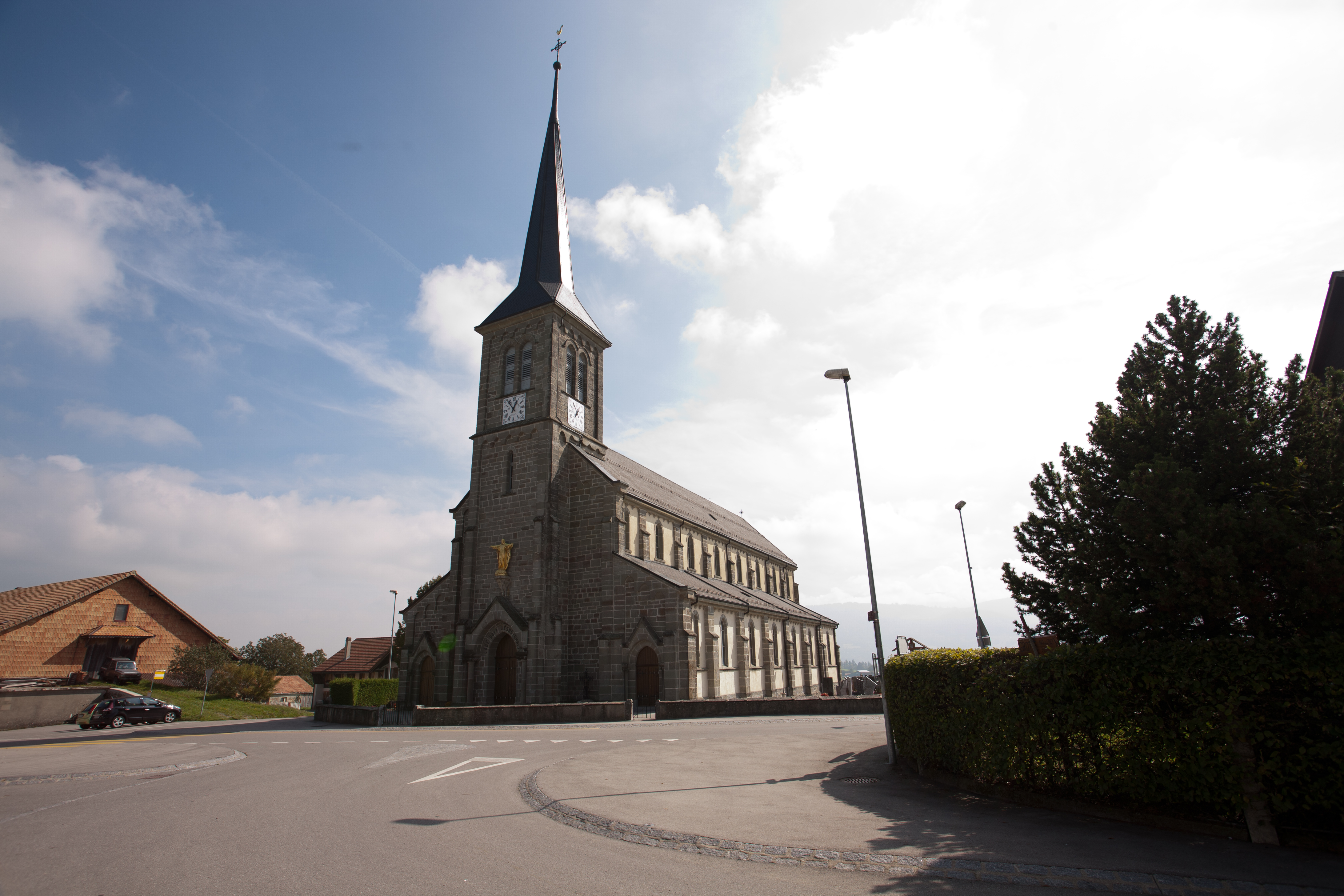 La Verreire Kirche